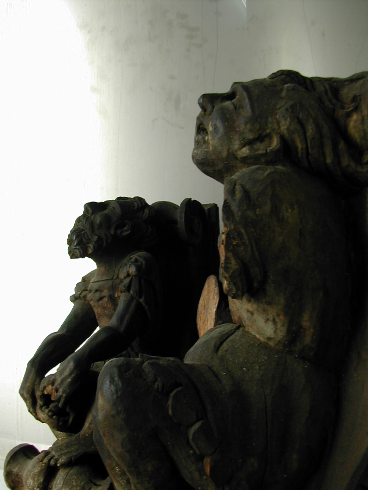 Dos de los canes conservados tras el expolio del ala noreste del Convento de Santo Domingo de La Guardia de Jaén.